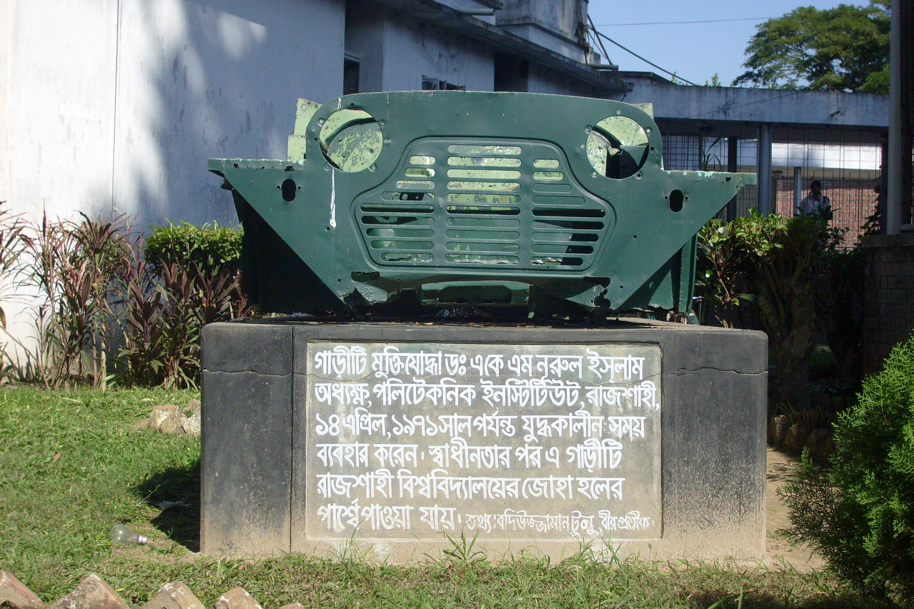 Rajshahi University, Rajshahi, Bangladesh